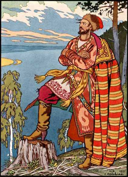 Билибин И., Степан Разин. 1935 г.